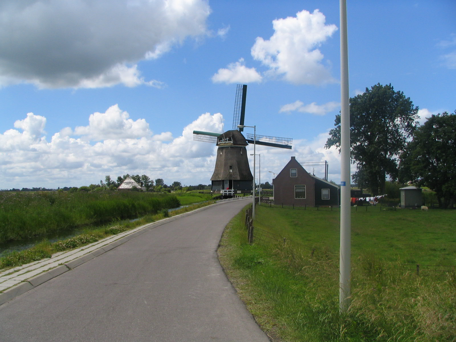 Eigen foto. Katwoude 19-6-2004 GerardM 19 jun 2004 17:43 (CEST)